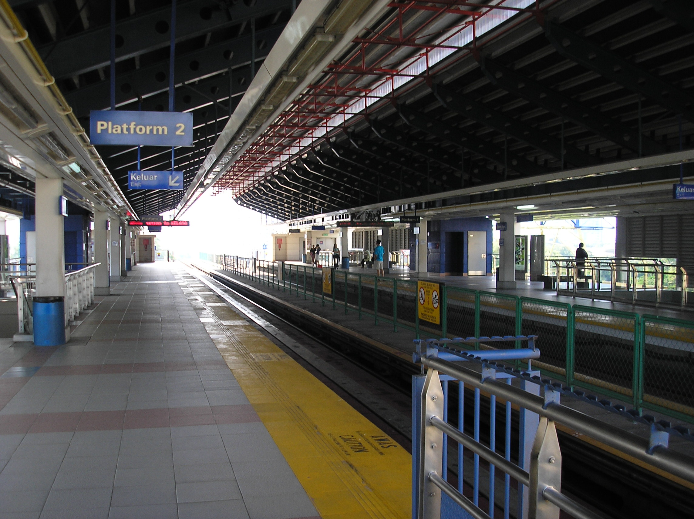 The Taman Jaya LRT station (Kelana Jaya Line), Kuala Lumpur, Malaysia.